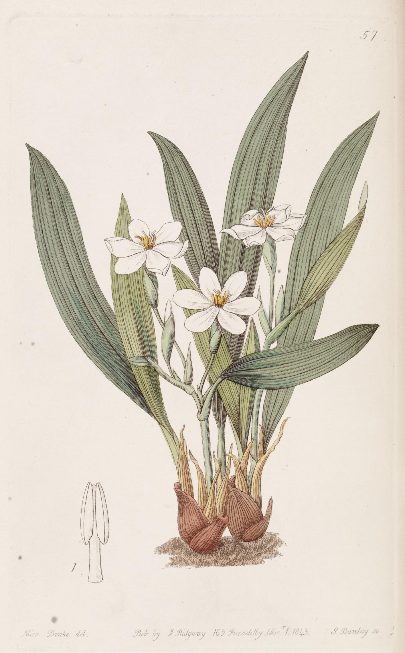 c 7 • - , \ t .